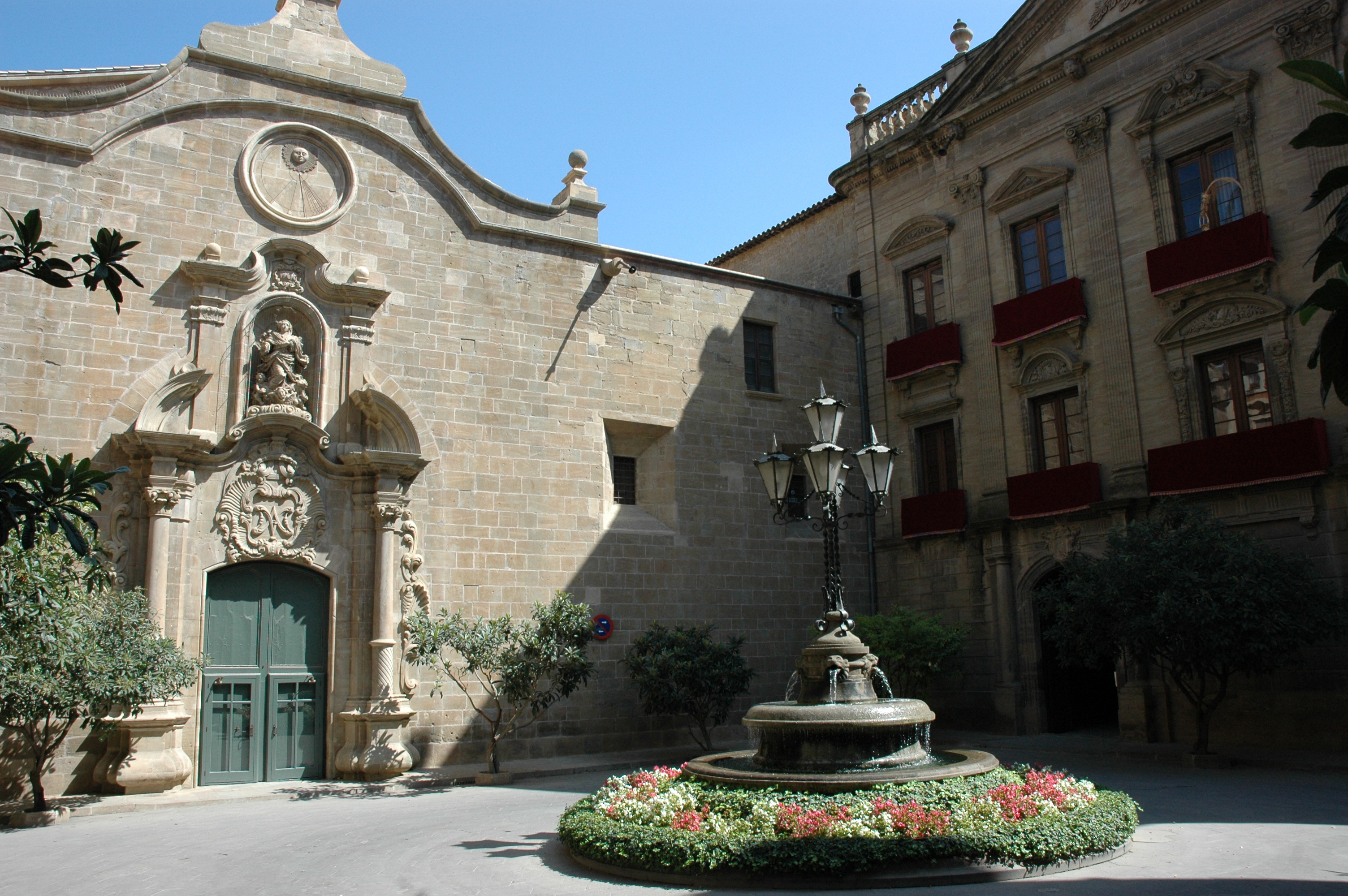 Solsona - Plaça del Palau